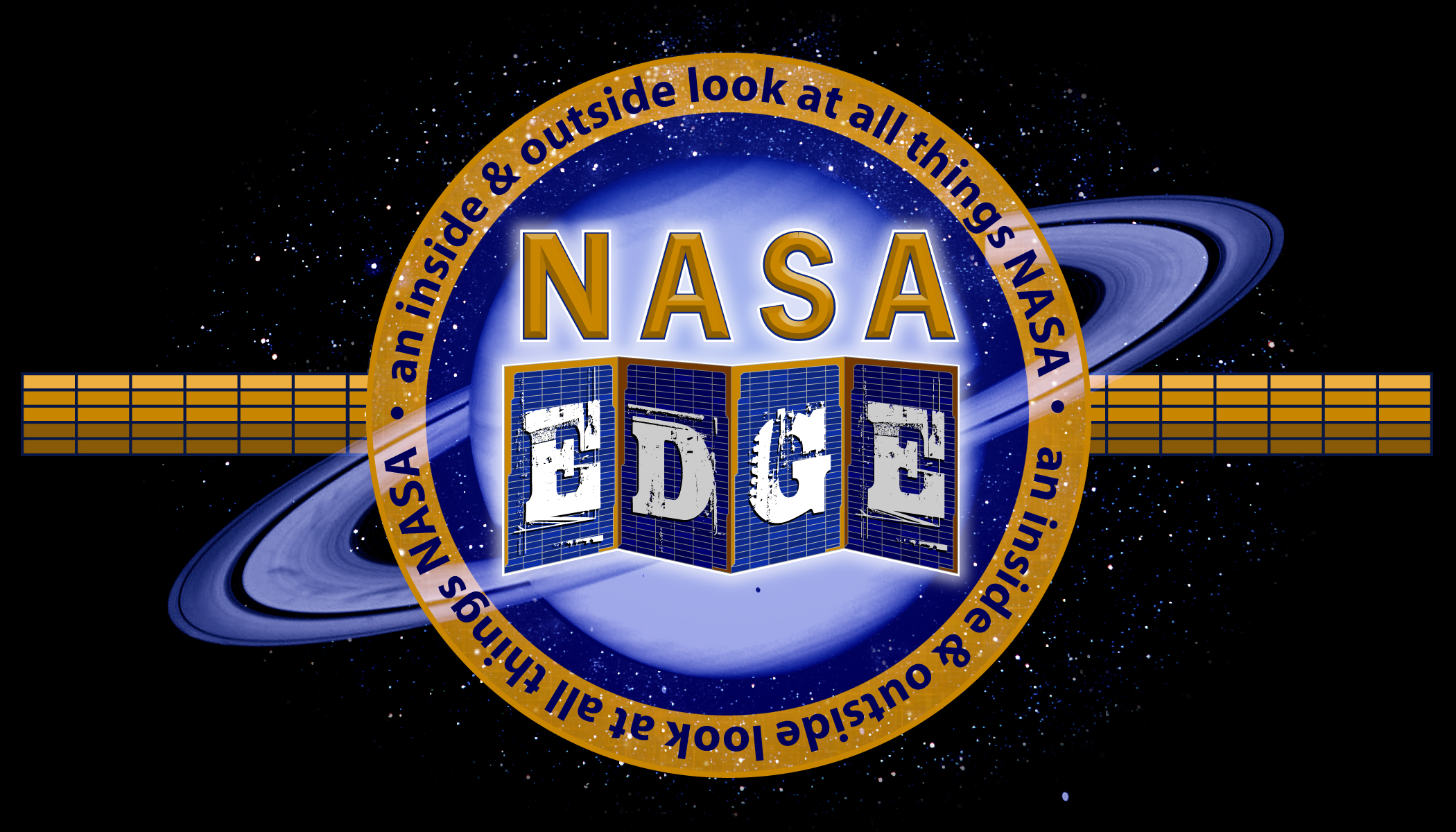 NASA EDGE Logo